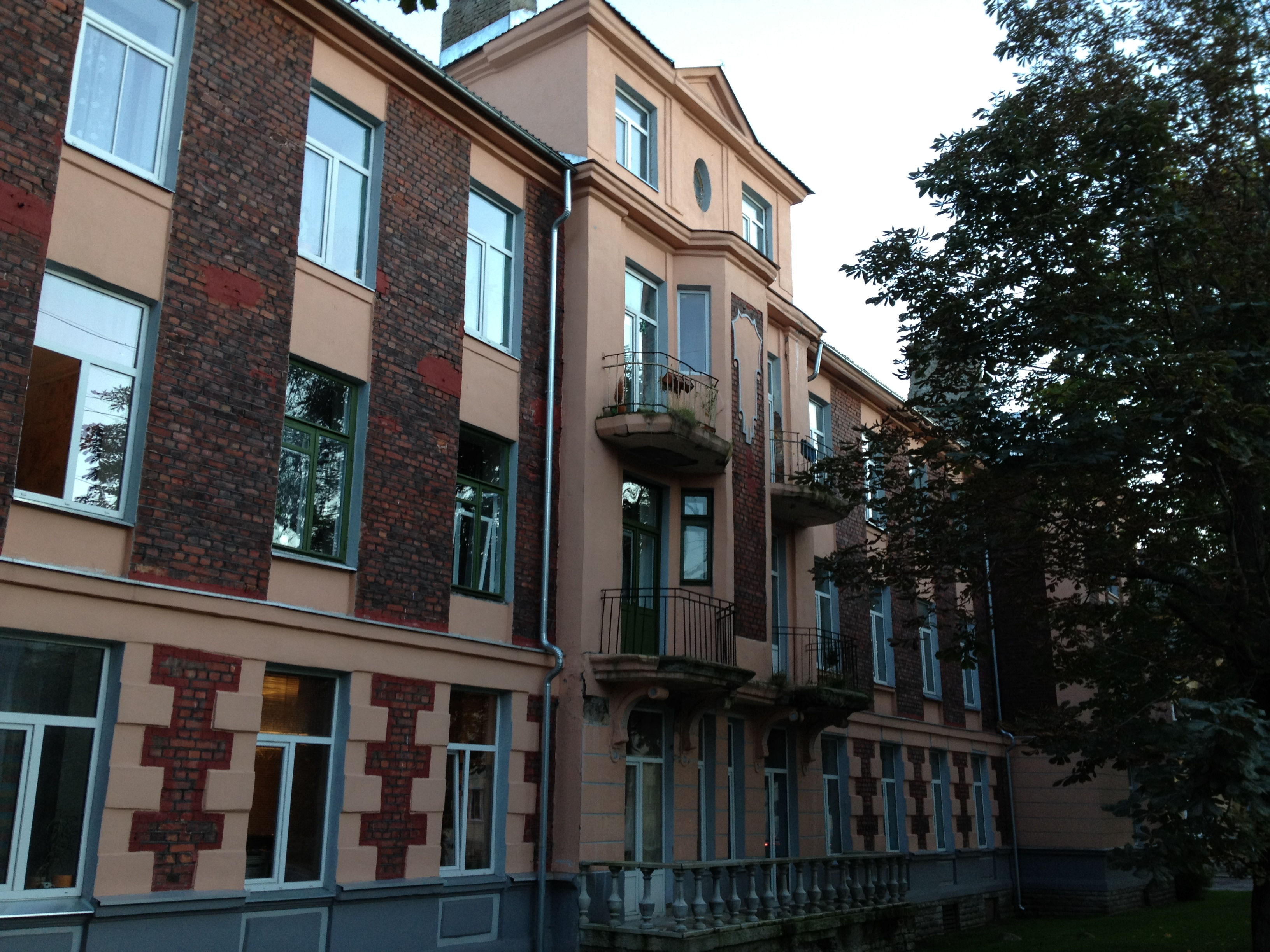 Peeter Suure Merekindluse garnisoni üleajateenijate elamu Erika tn 2, 1915. a.